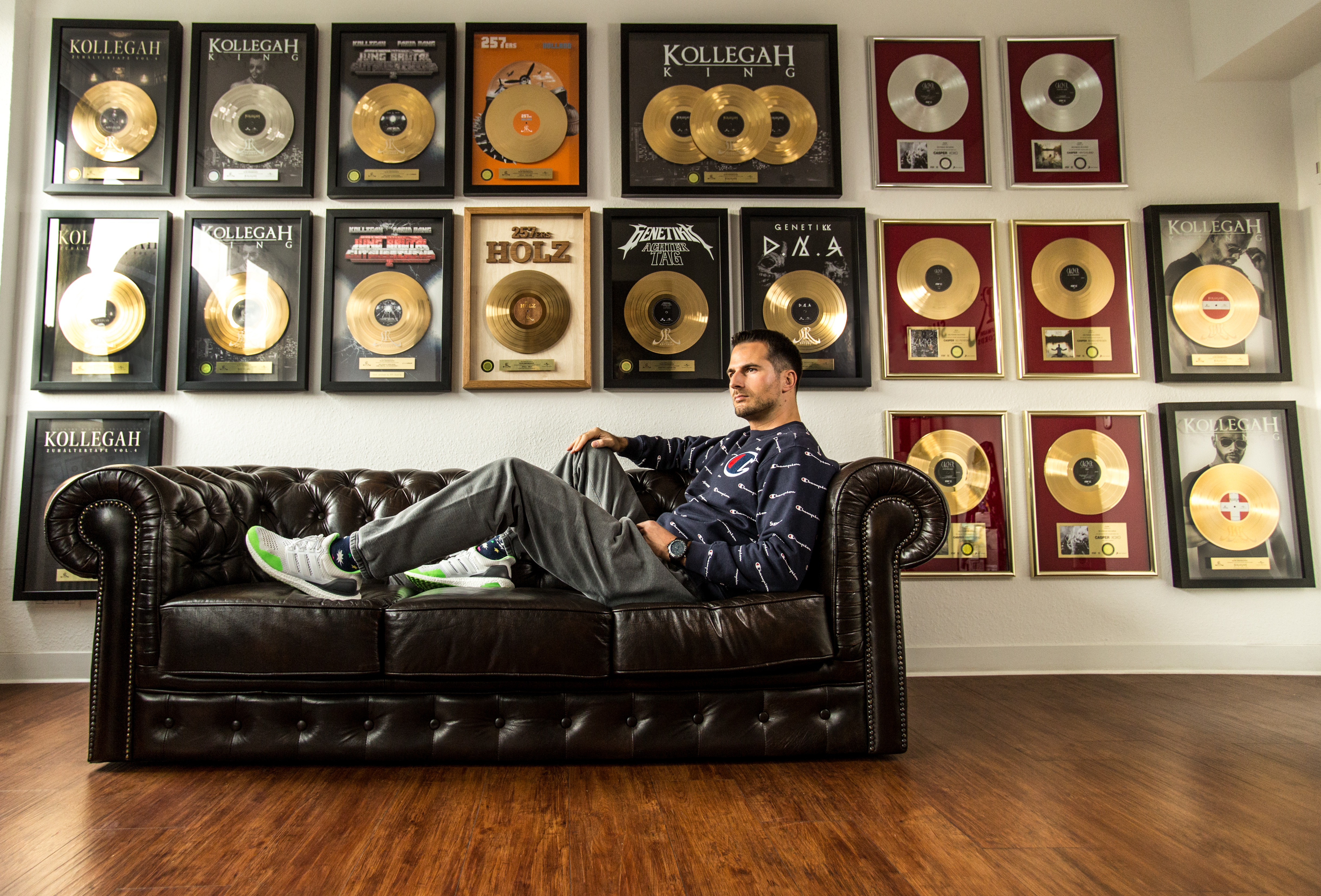 Elvir Omerbegovic im Büro bei „Selfmade Records“